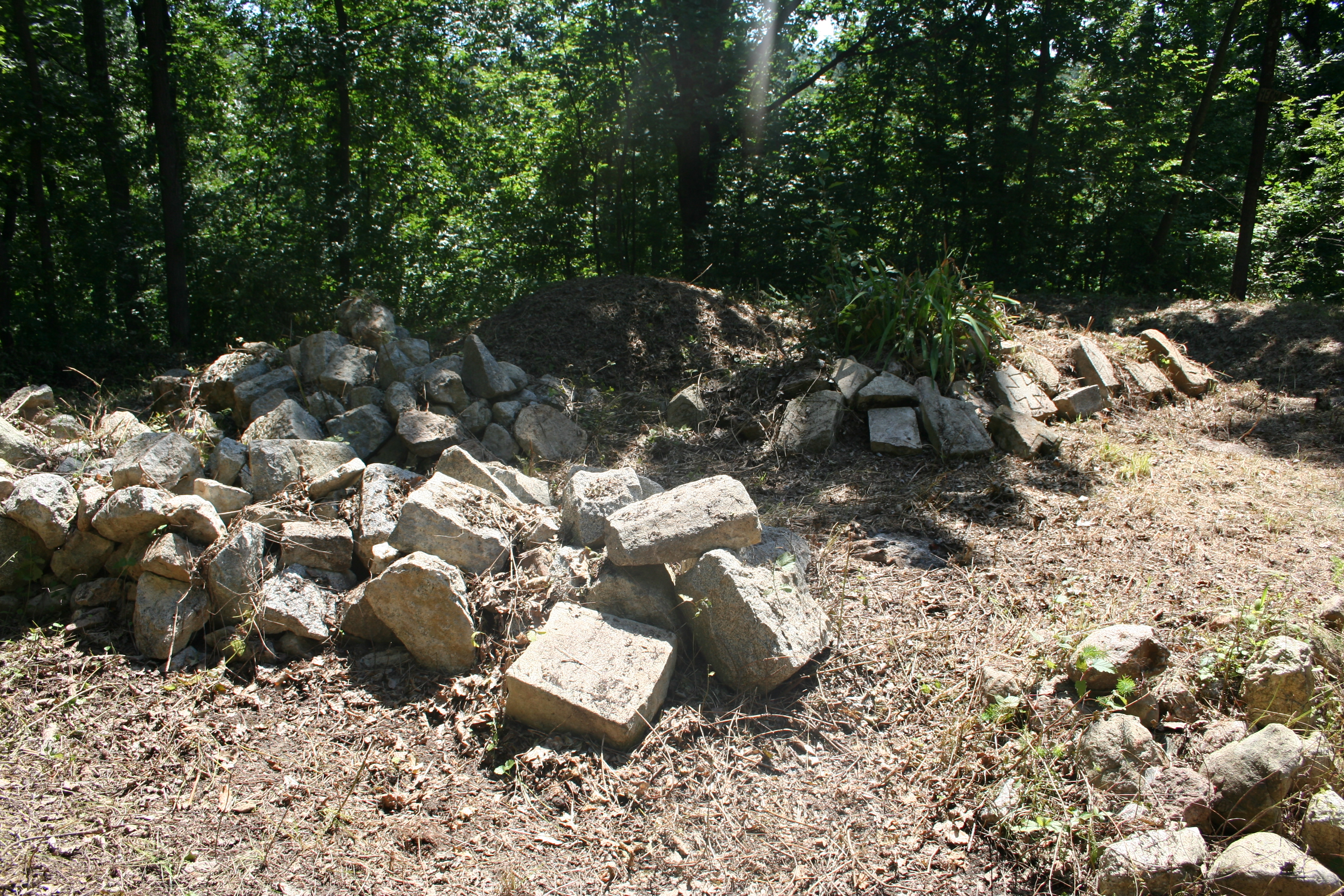 Ruševine manastira na Iverku, Jarebice